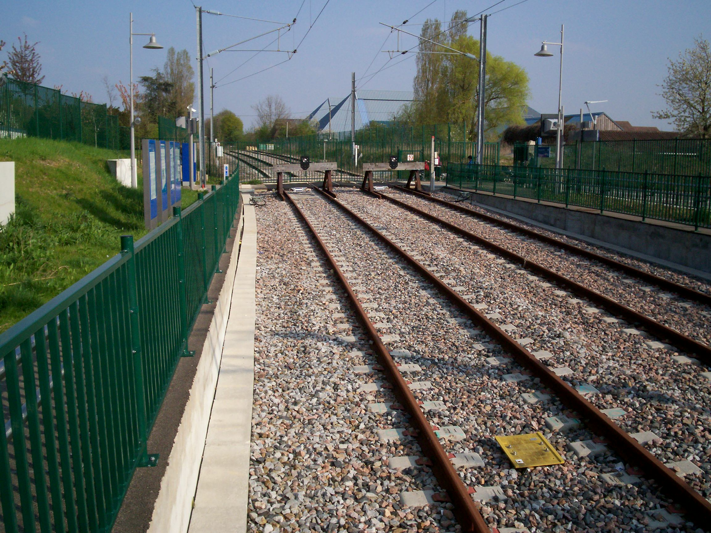 Butoirs à Noisy-le-Roi